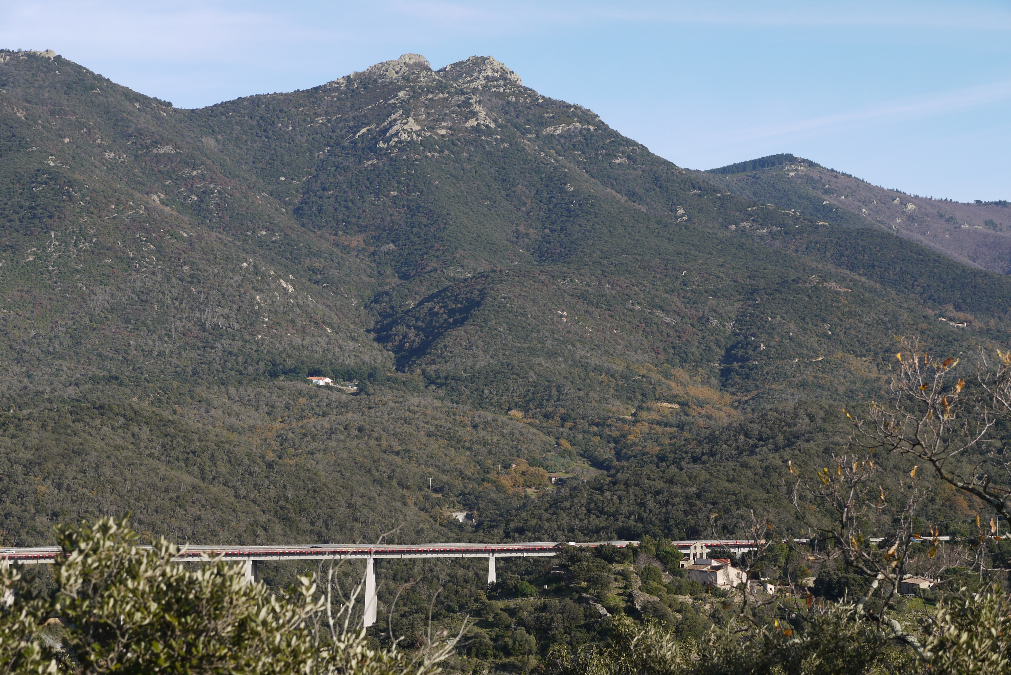 Le Puig Sant Cristau, l'autoroute A9 et l'église Sainte-Marie de La Cluse-Haute, vus depuis les hauteurs de Maureillas.